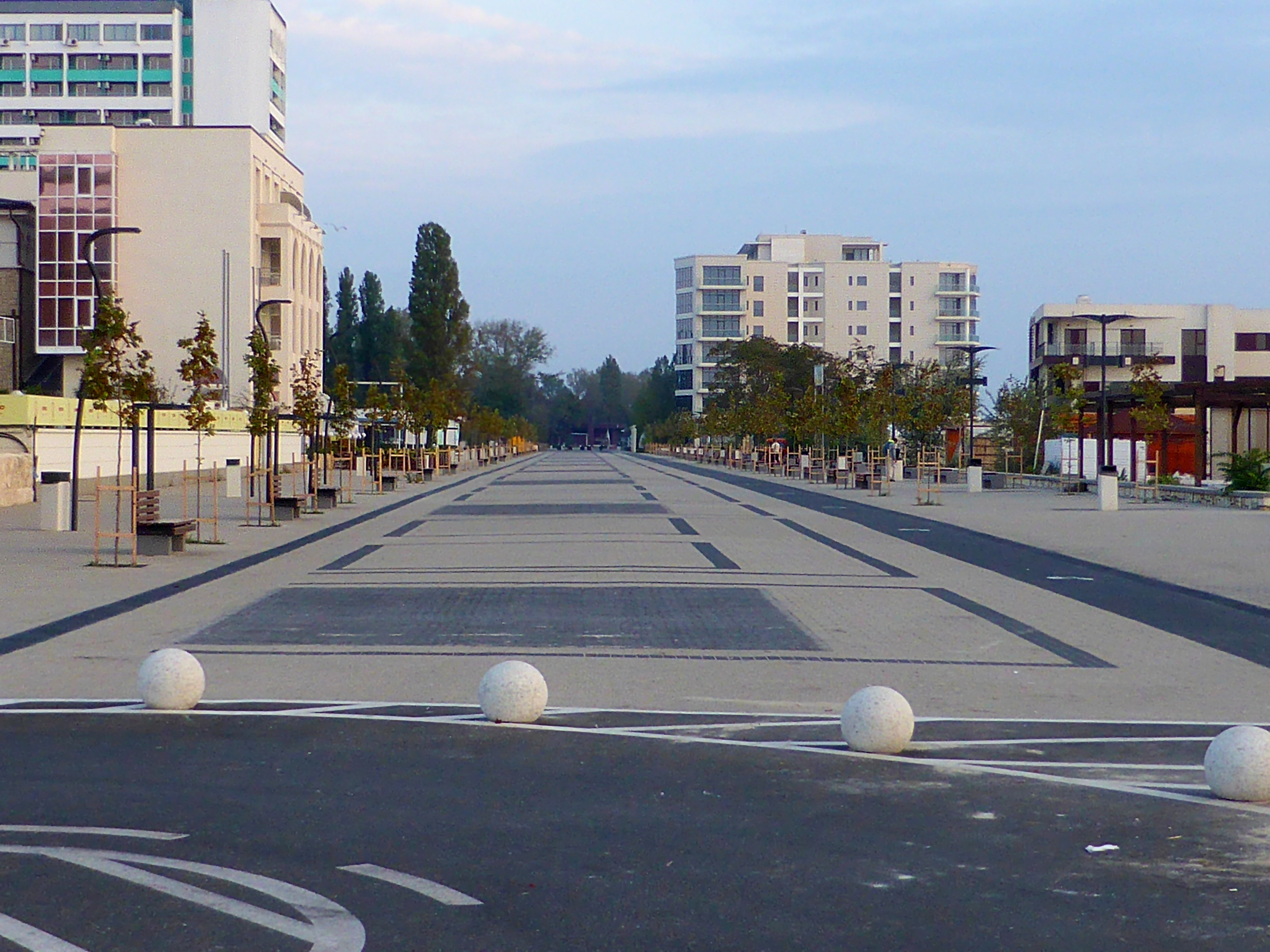 Strandpromenade von Mamaia in der Nachsaison.